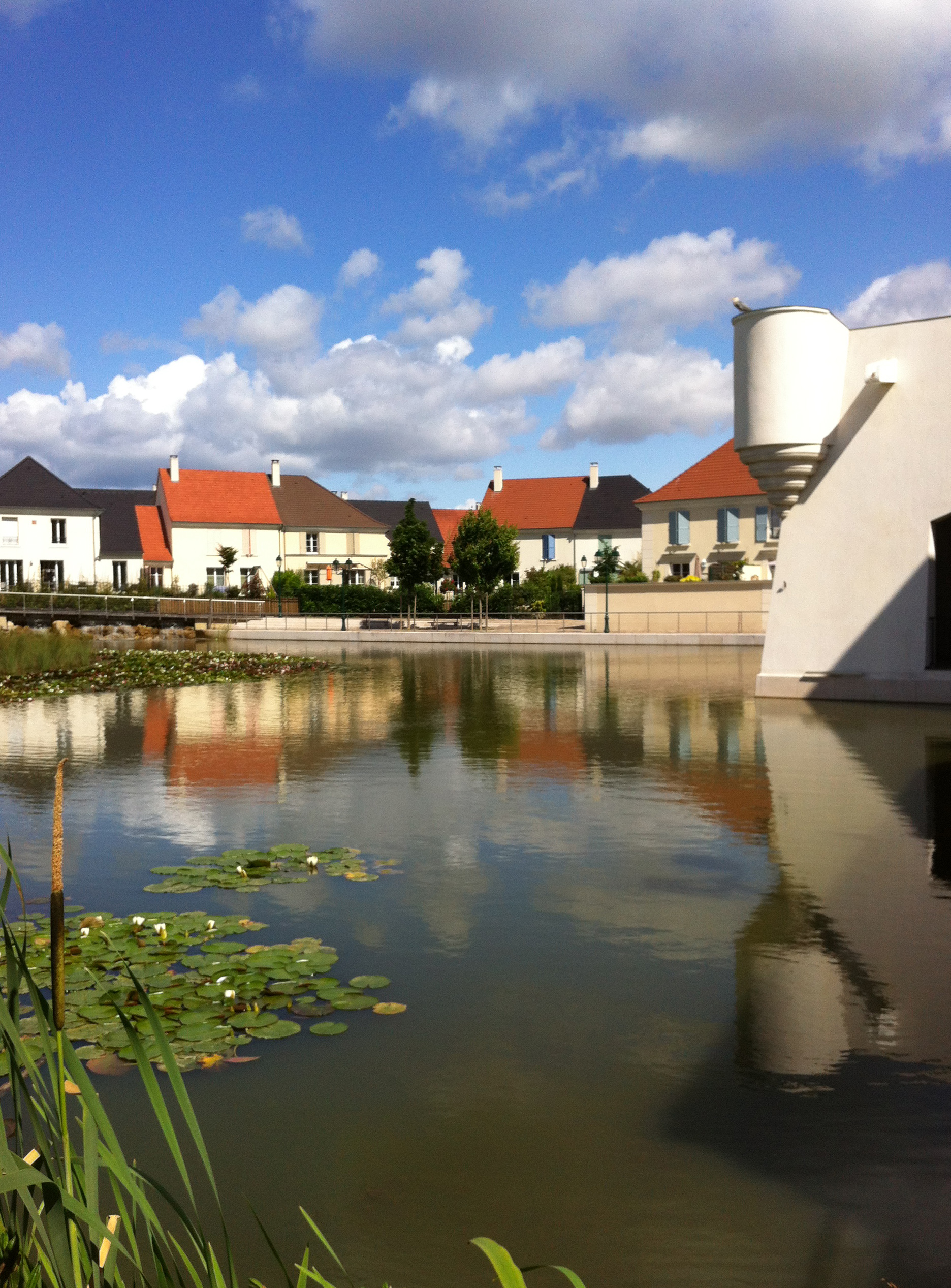 Plan d'eau dans le quartier Saint-Eloi à Wissous.